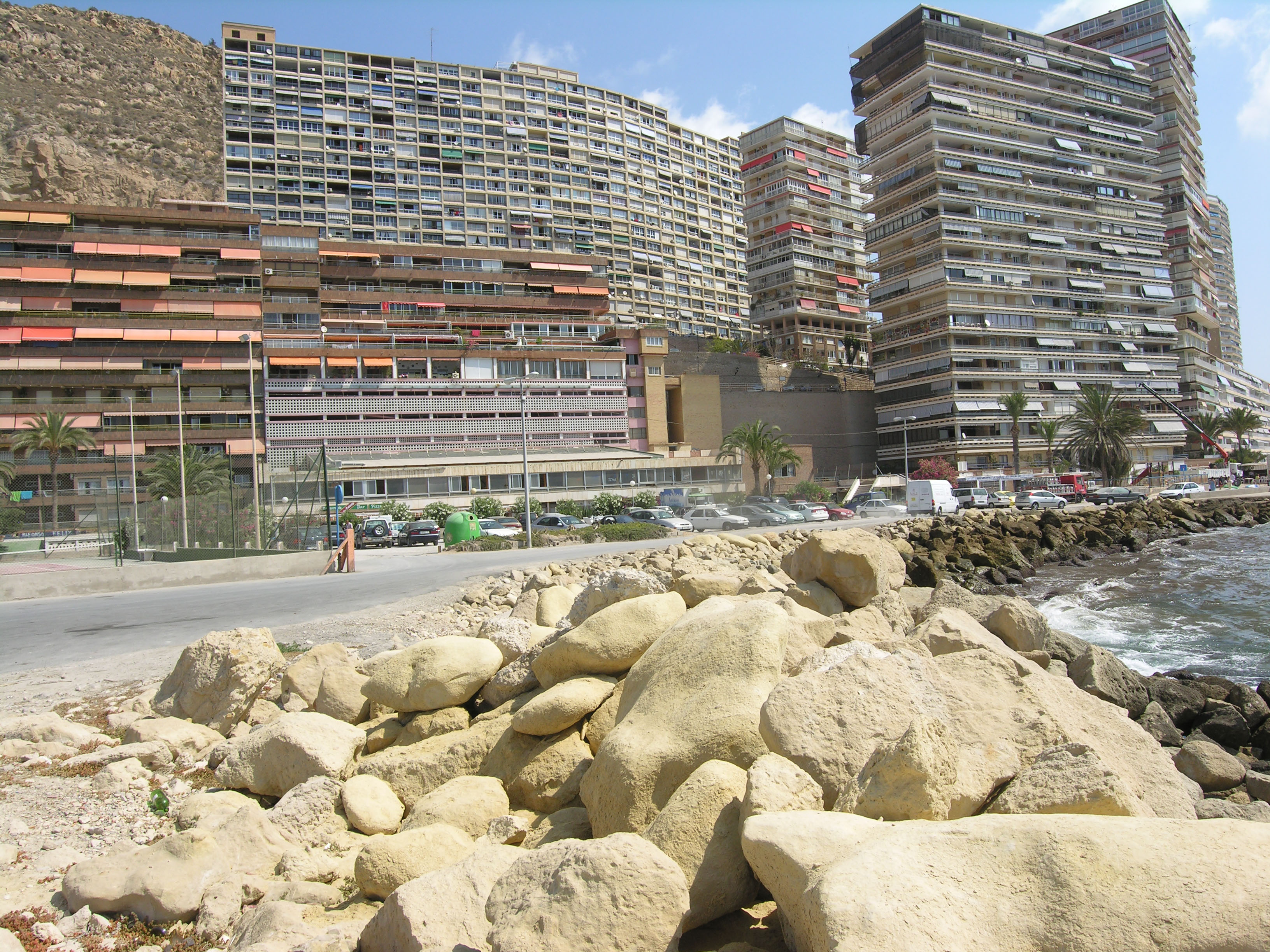 Albufereta, Alicante, Spain